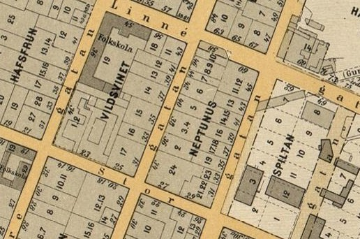 Del av 1899 års karta över Stockholm med kvarteren Vildsvinet och Neptunus, Östermalm